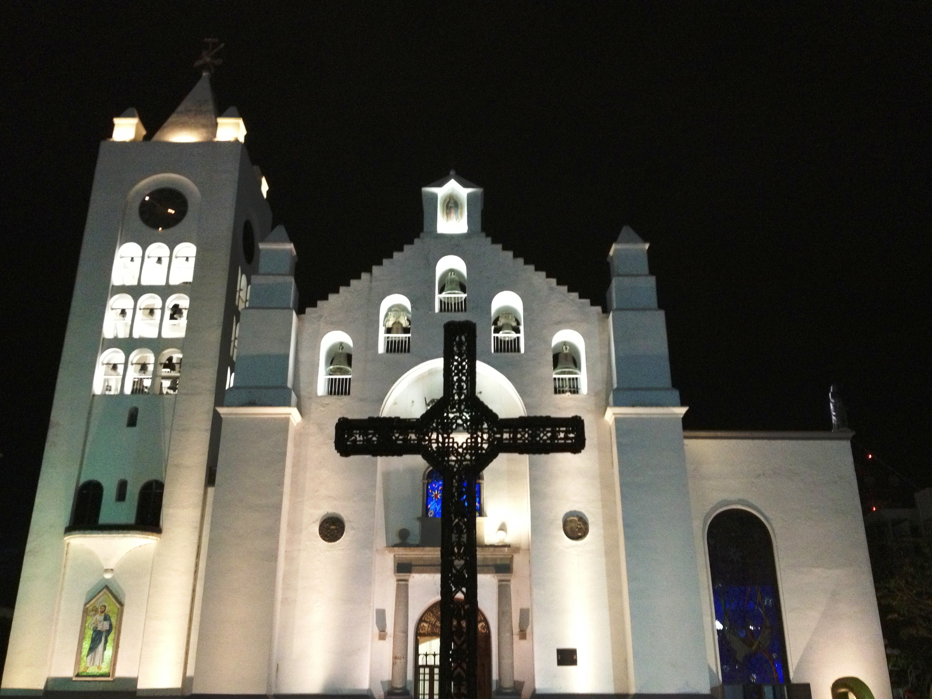 Vista nocturna de la Catedral de San Marcos en Tuxtla Gutierrez Chiapas